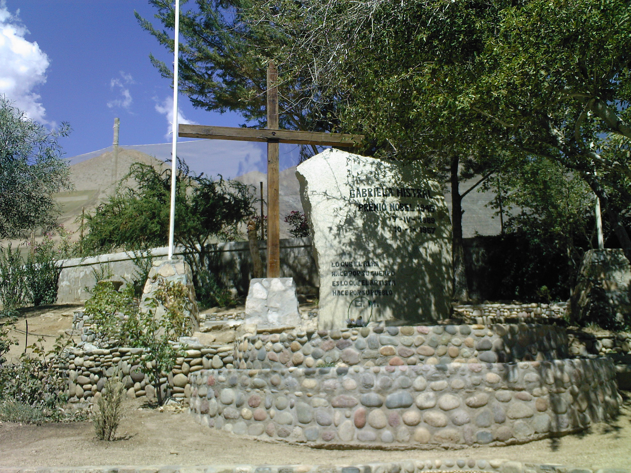 Tumba de Gabriela Mistral This is a photo of a national monument in Chile: 352